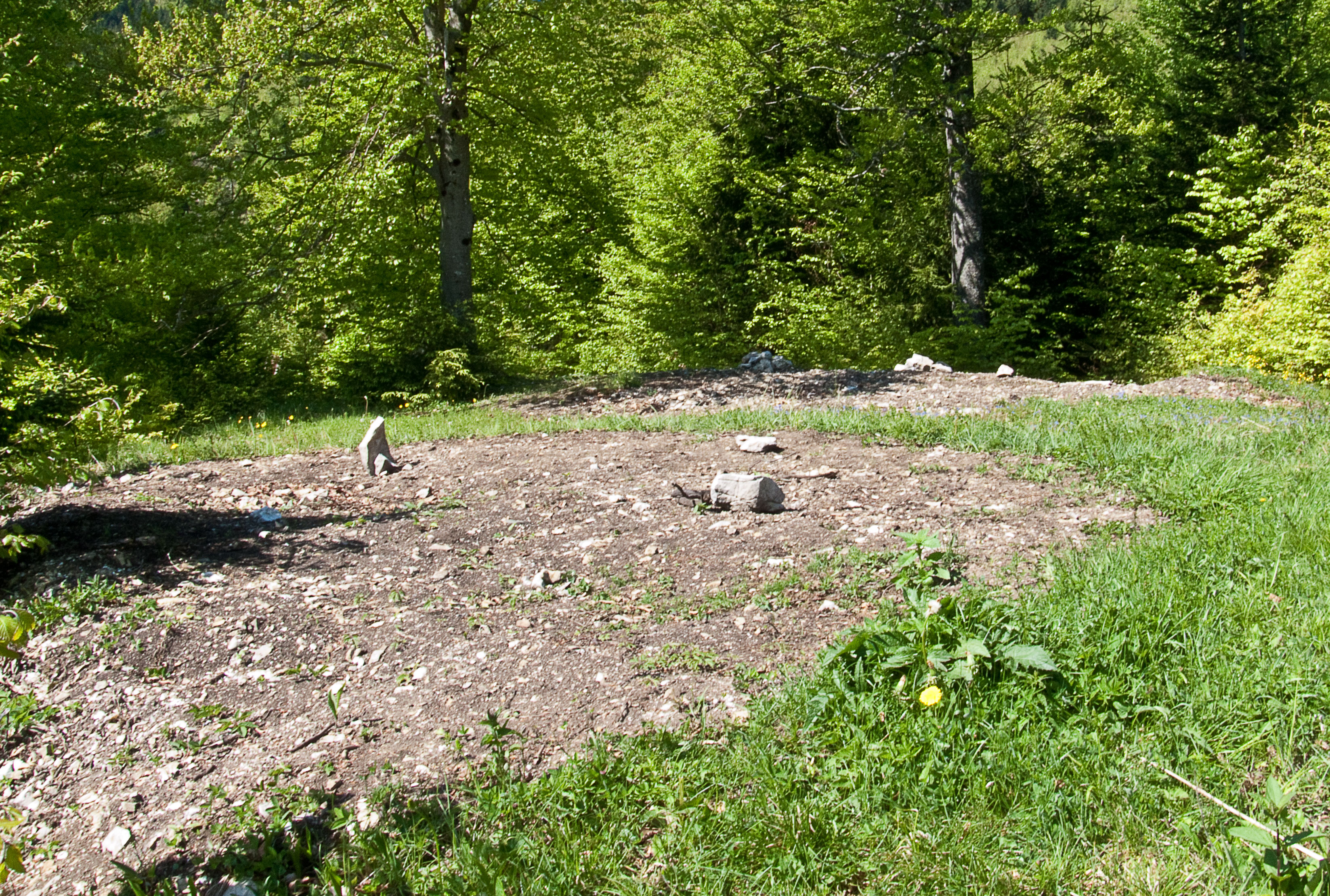 Ausgrabungsstelle auf den Spielleitenköpfl. Die Ausgegrabenen Mauerreste sind wieder verfüllt worden um Zerstörungen und Beschädigungen zu vermeiden.